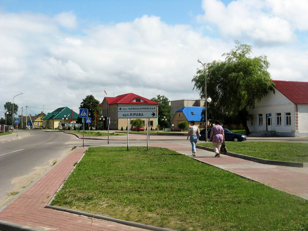 Беларуская (тарашкевіца): Азёры